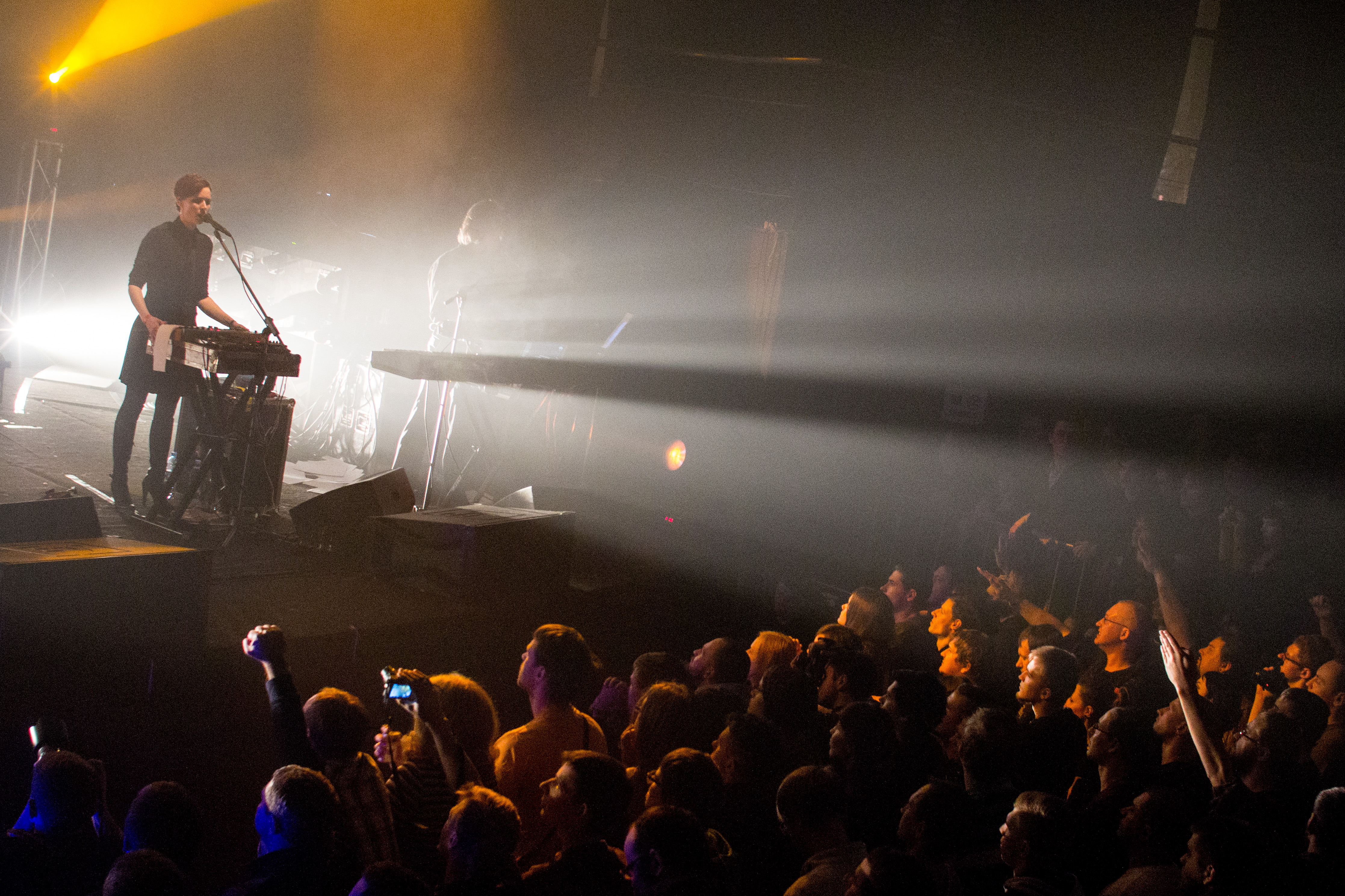 Laibach in Saint Petersburg 2013 - Mina Špiler